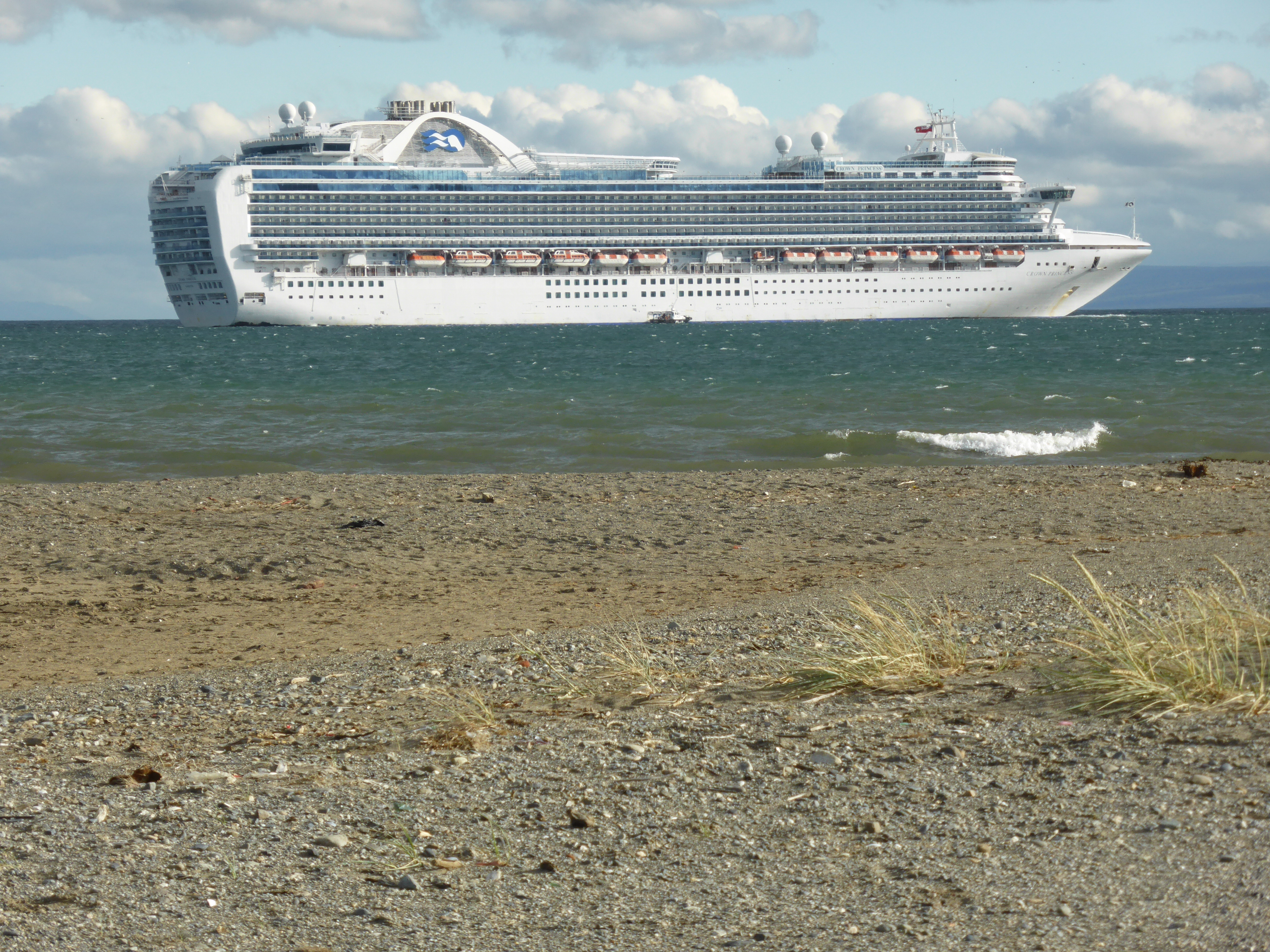 Crucero (buque de pasajeros) en el Estrecho de Magallanes, frente a la ciudad de Punta Arenas, al sur de Chile. El buque es el "Crown Princess", matriculado en Hamilton, Bermudas; de la compañía "Princess Cruises" perteneciente a la "Carnival Corporation & plc". IMO: 9293399